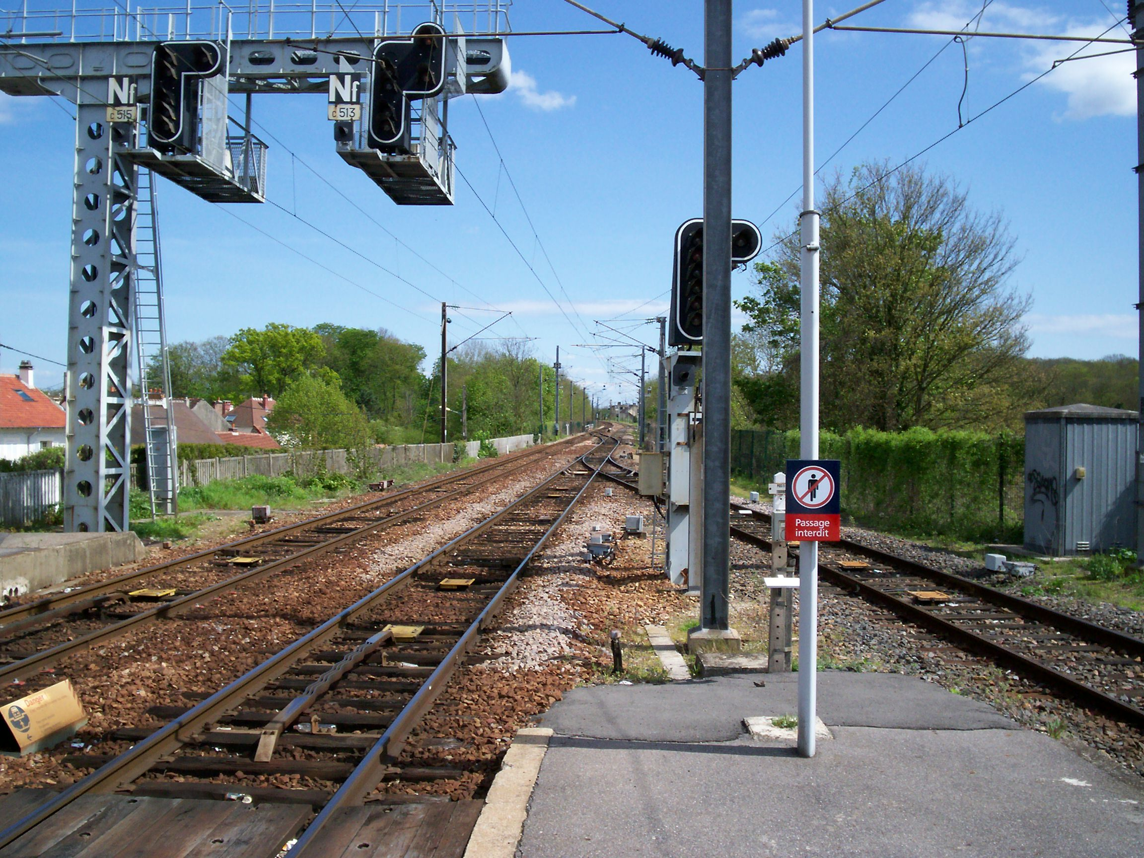 Voies SNCF depuis Tournan vers Coulommiers